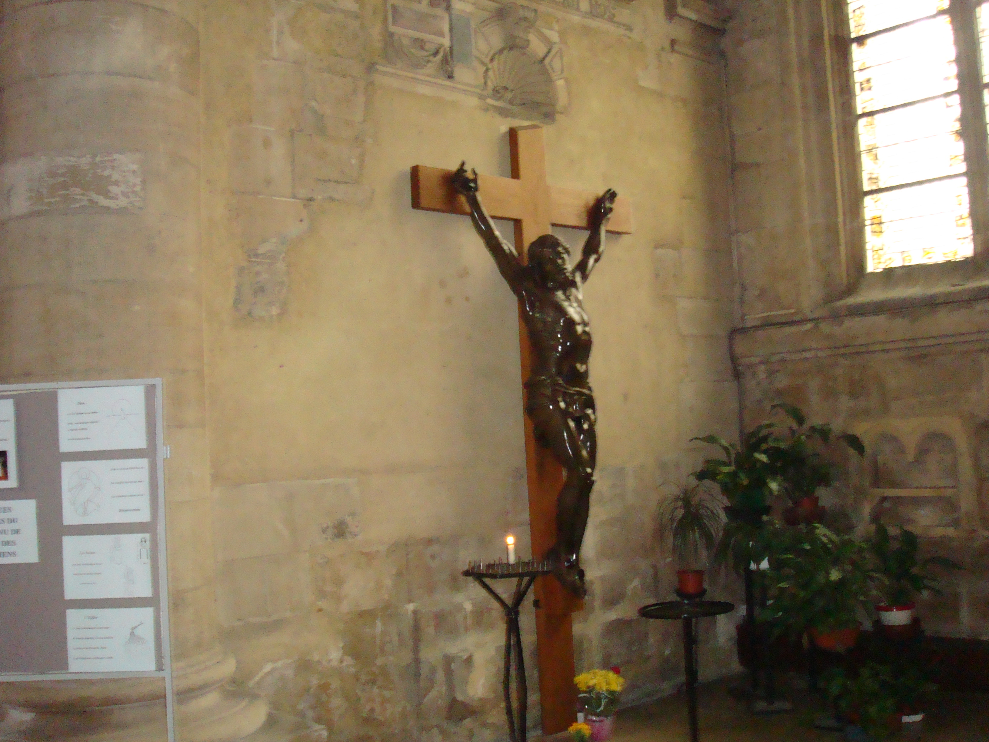 Croix avec statut de Jésus, à l'emplacement d'un ancien autel.